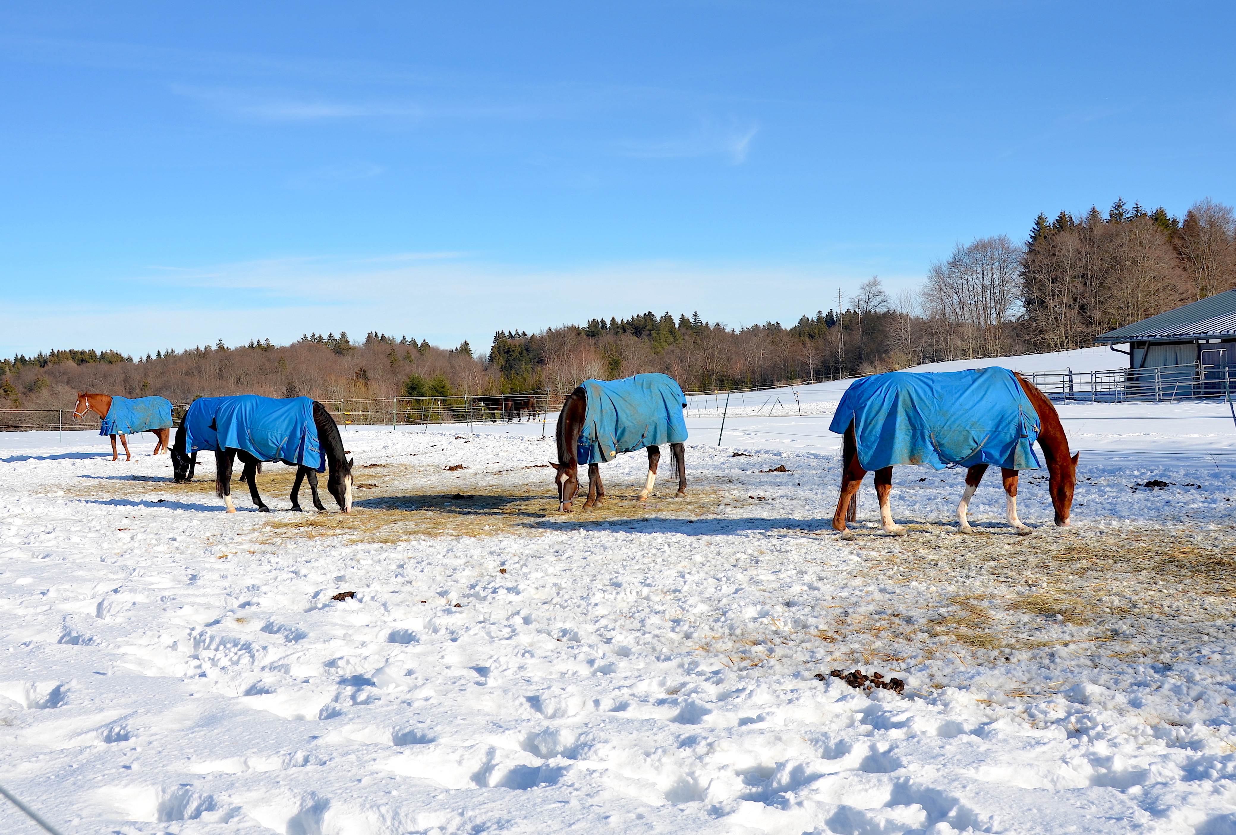 Pferdepension im Winter auf der Schwäbischen Alb